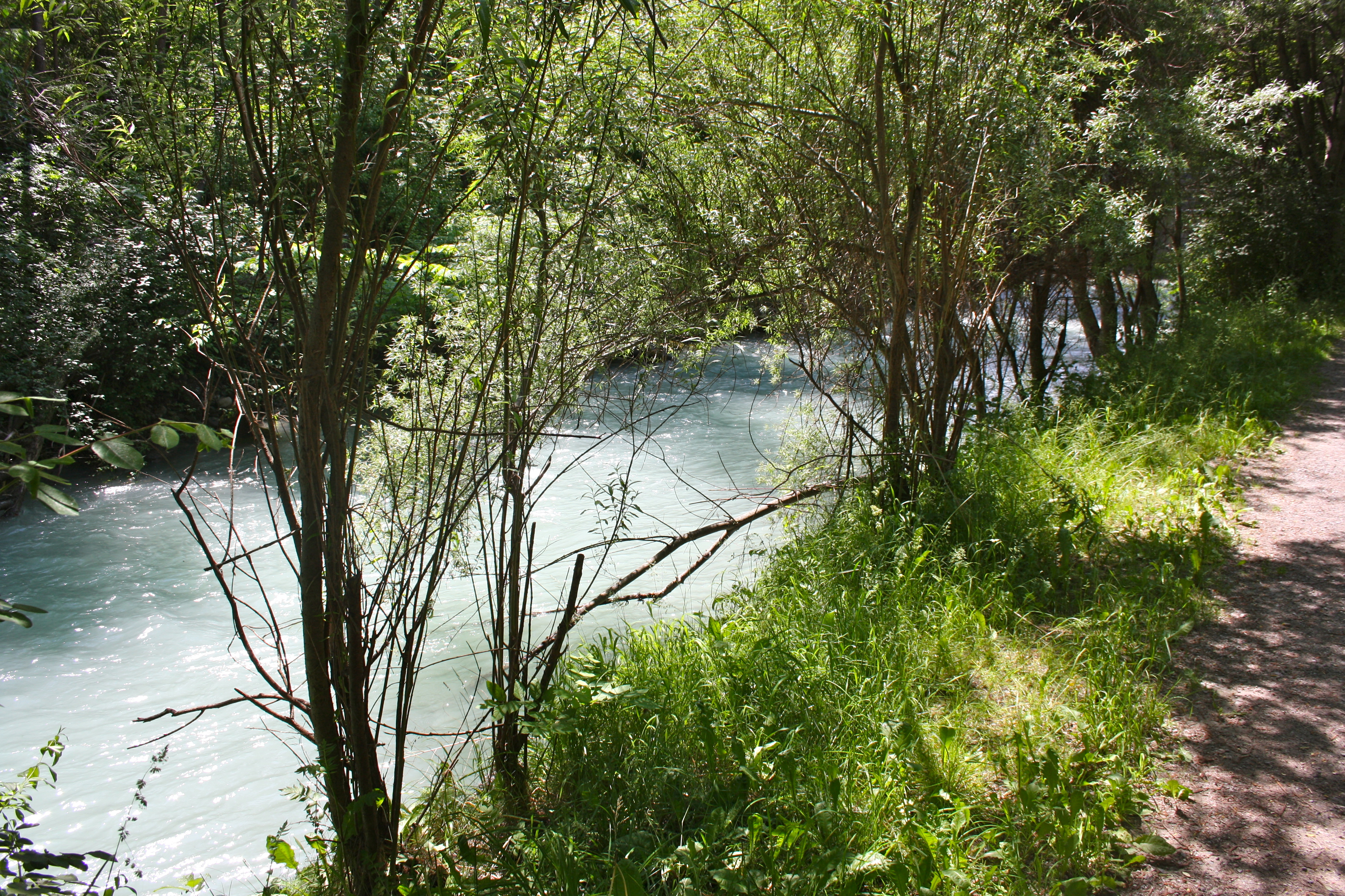 Gurglbach in der Gemeinde Karrösten.